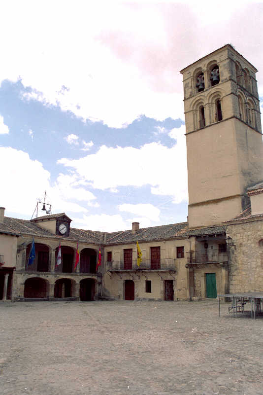 Plaza Mayor e Iglesia de Pedraza en la provincia de Segovia (España). Tomada por --JMSE el 2 de Julio de 2003 y cedida a Wikipedia.